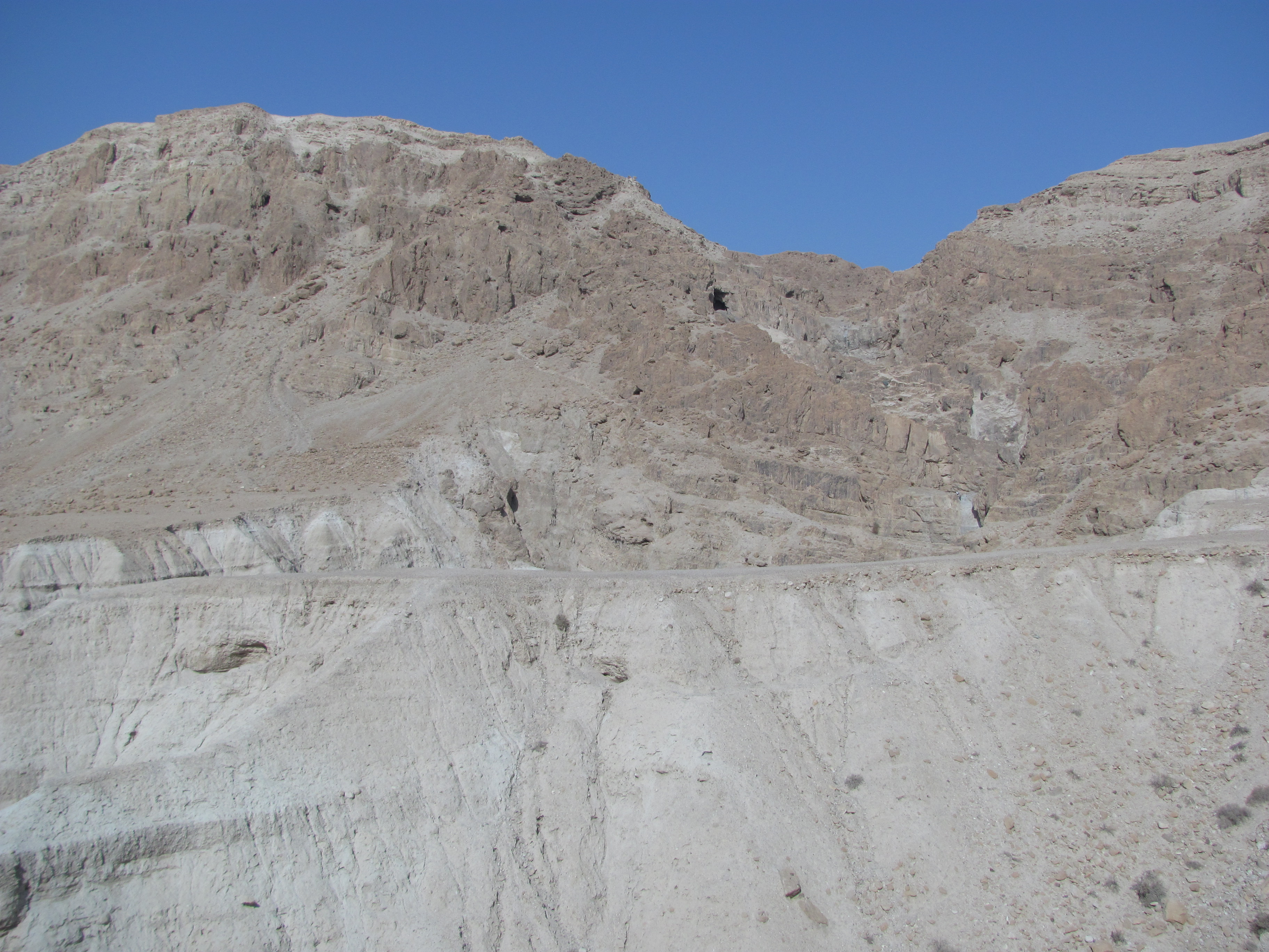 Alrededores de Qumrán.